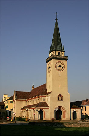 Payerne: katholische Kirche